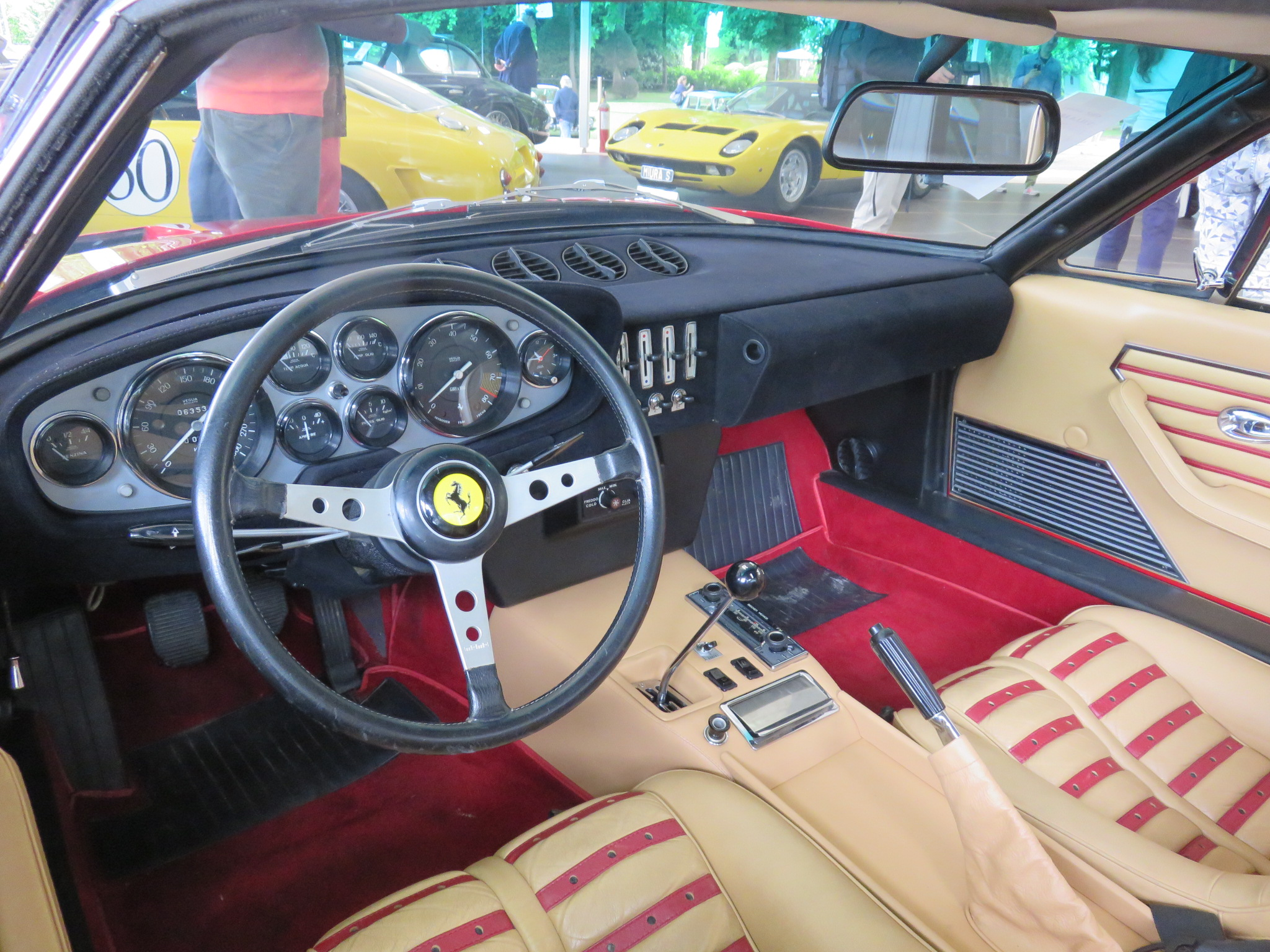 Concorso d'eleganza Villa d'Este 2015, Ferrari 365 GTB/4 Daytona Berlineta by Scagliatti 1973, mise aux enchères à 728 000 €